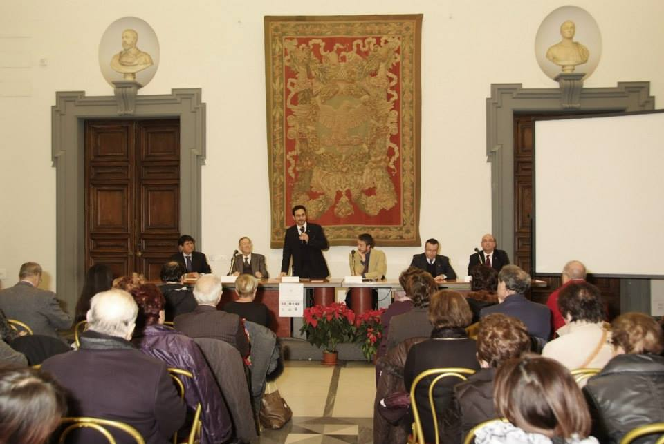 Ottavo Simposio Filomatico Internazionale, Italia, Roma 2013